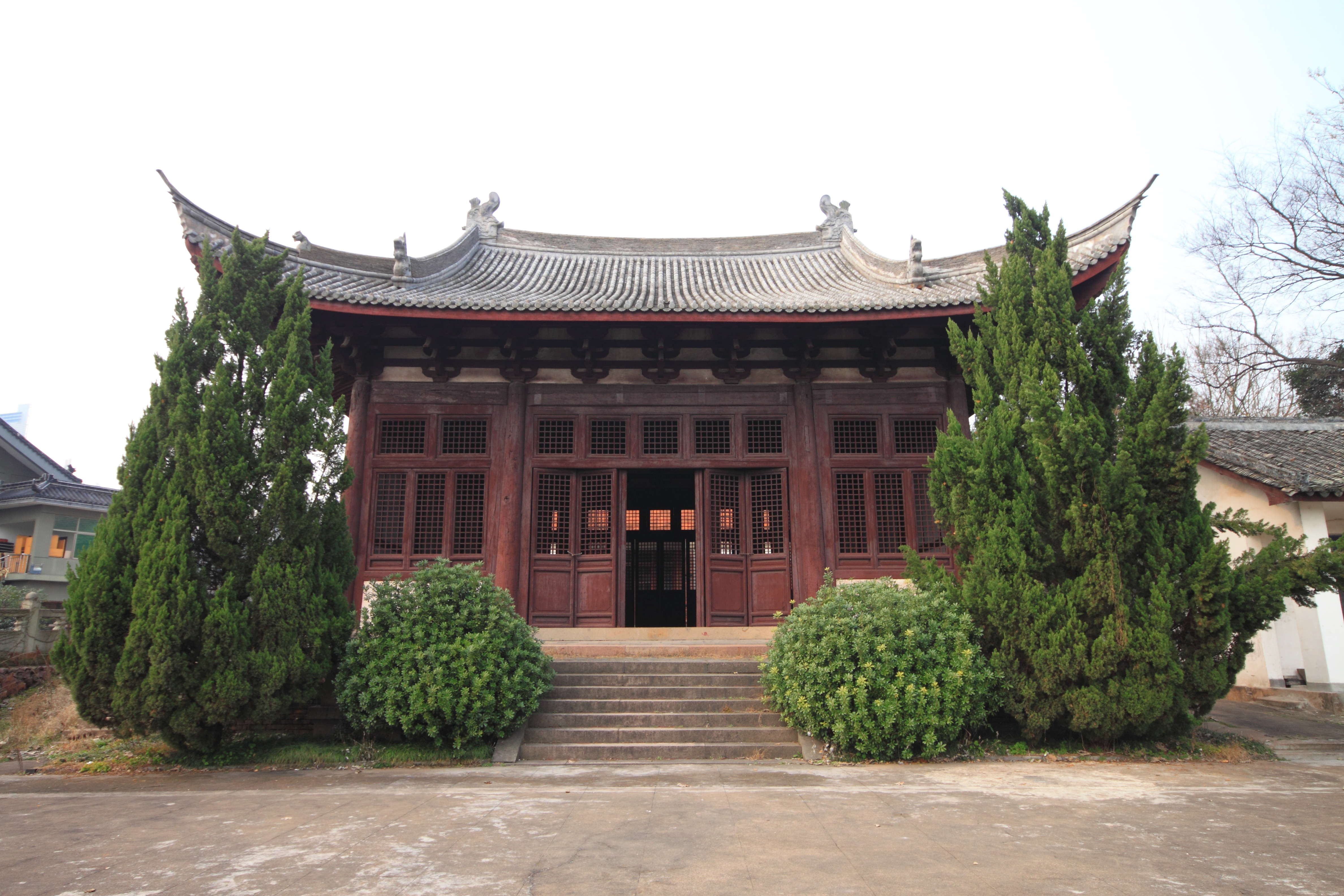 浙江金华天宁寺大殿 —— 大殿